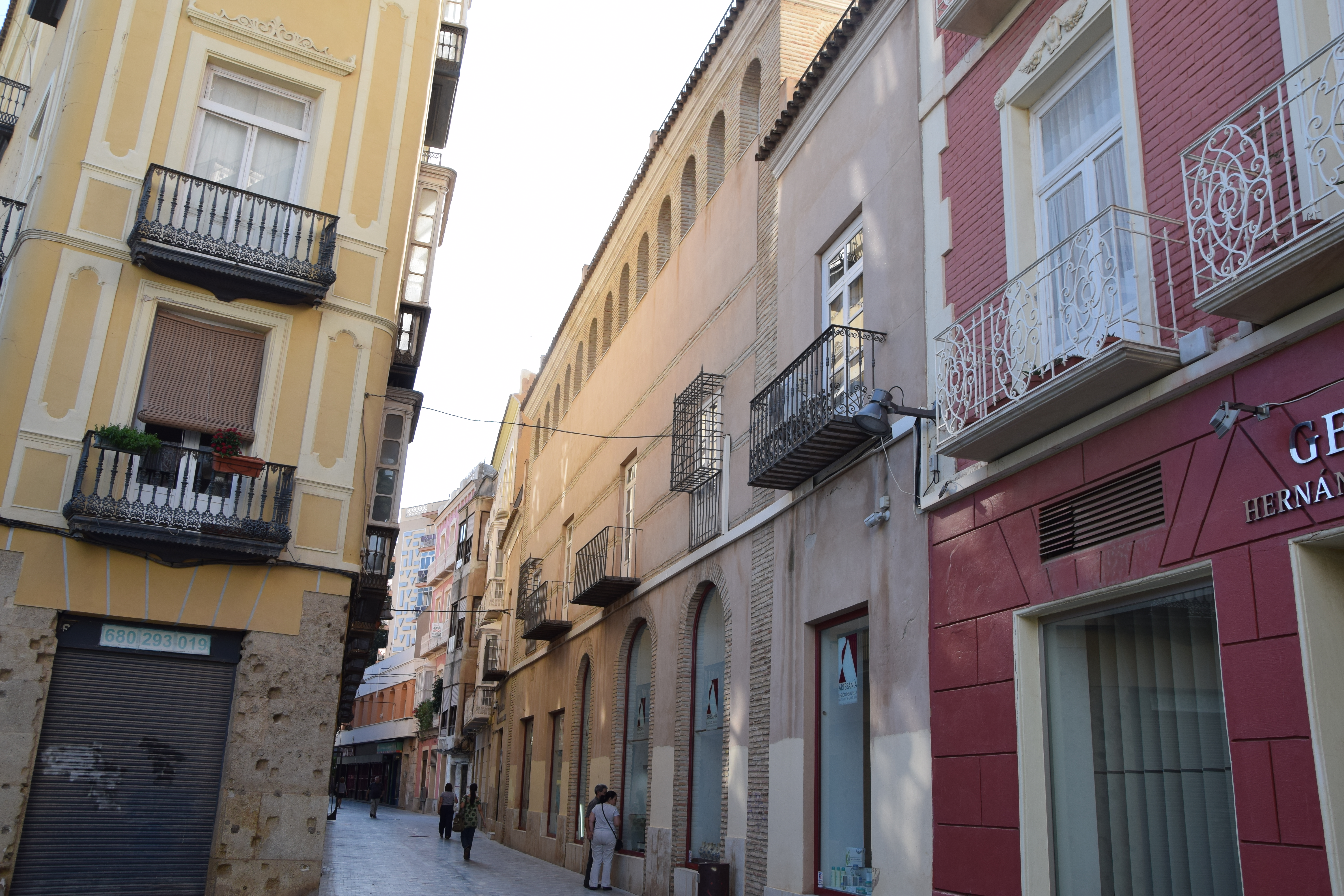 Palacio de MolinaResidencia de los marqueses de Pinares